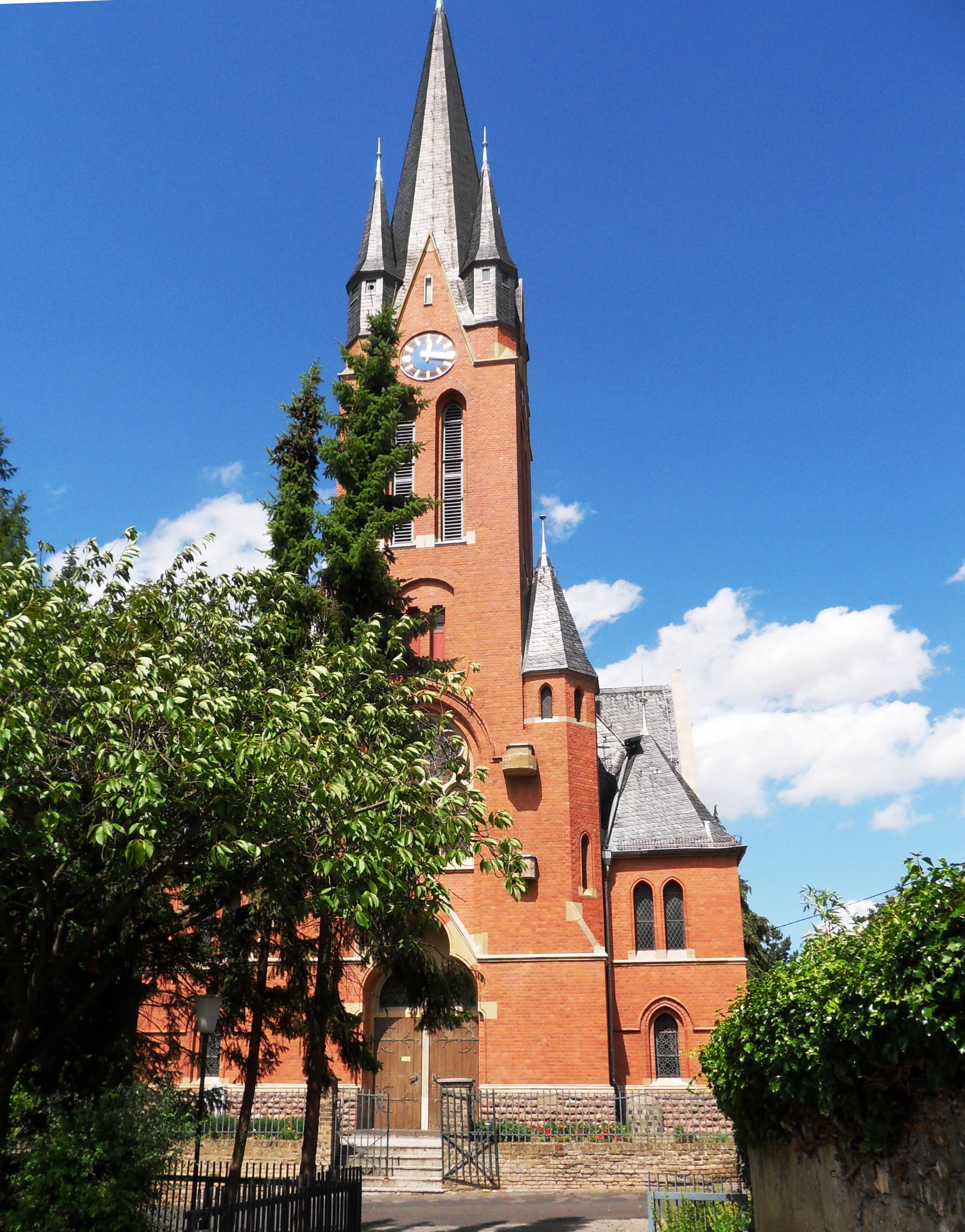 Kirchturm der evangelischen Kirche von Delkenheim